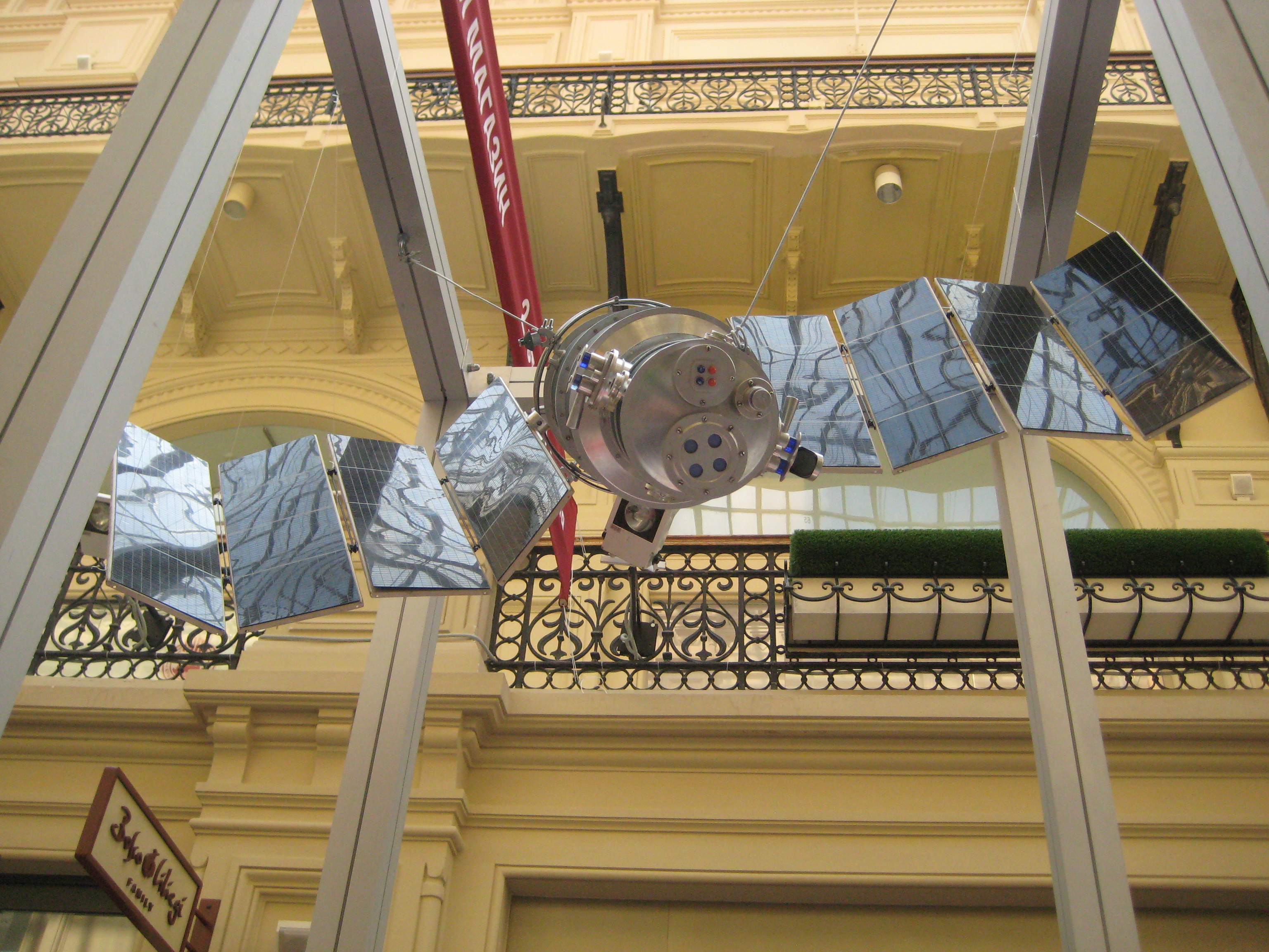 Макет метеорологического спутника земли "Метеор" с солнечными батареями. 1976. Государственный центральный музей современной истории России.